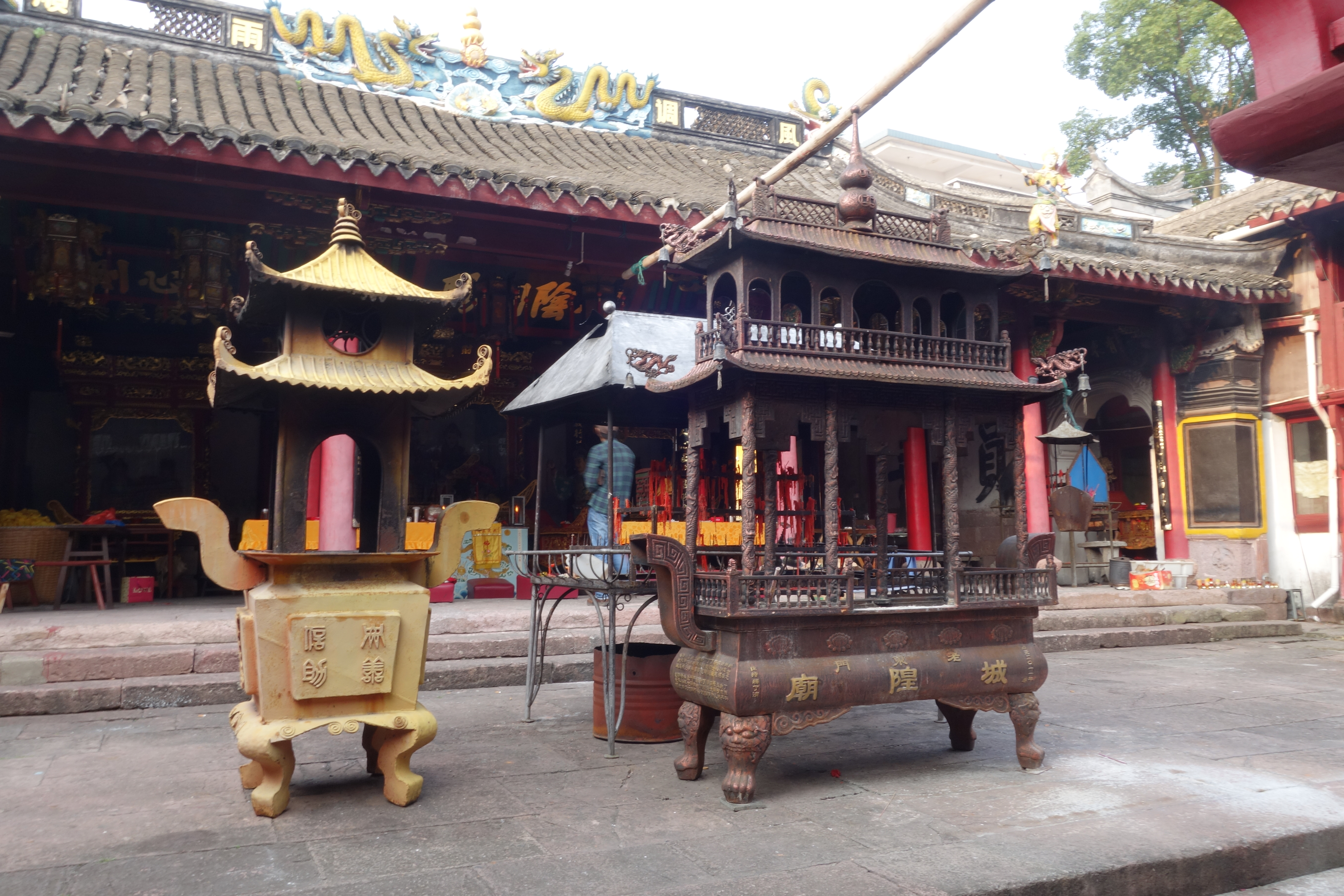 石浦东门城隍庙